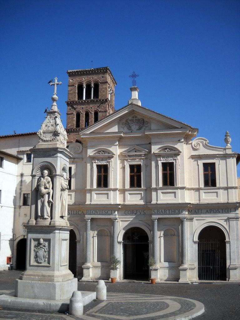 Chiesa_San_Bartolomeo_all'Isola_Tiberina,_Roma.